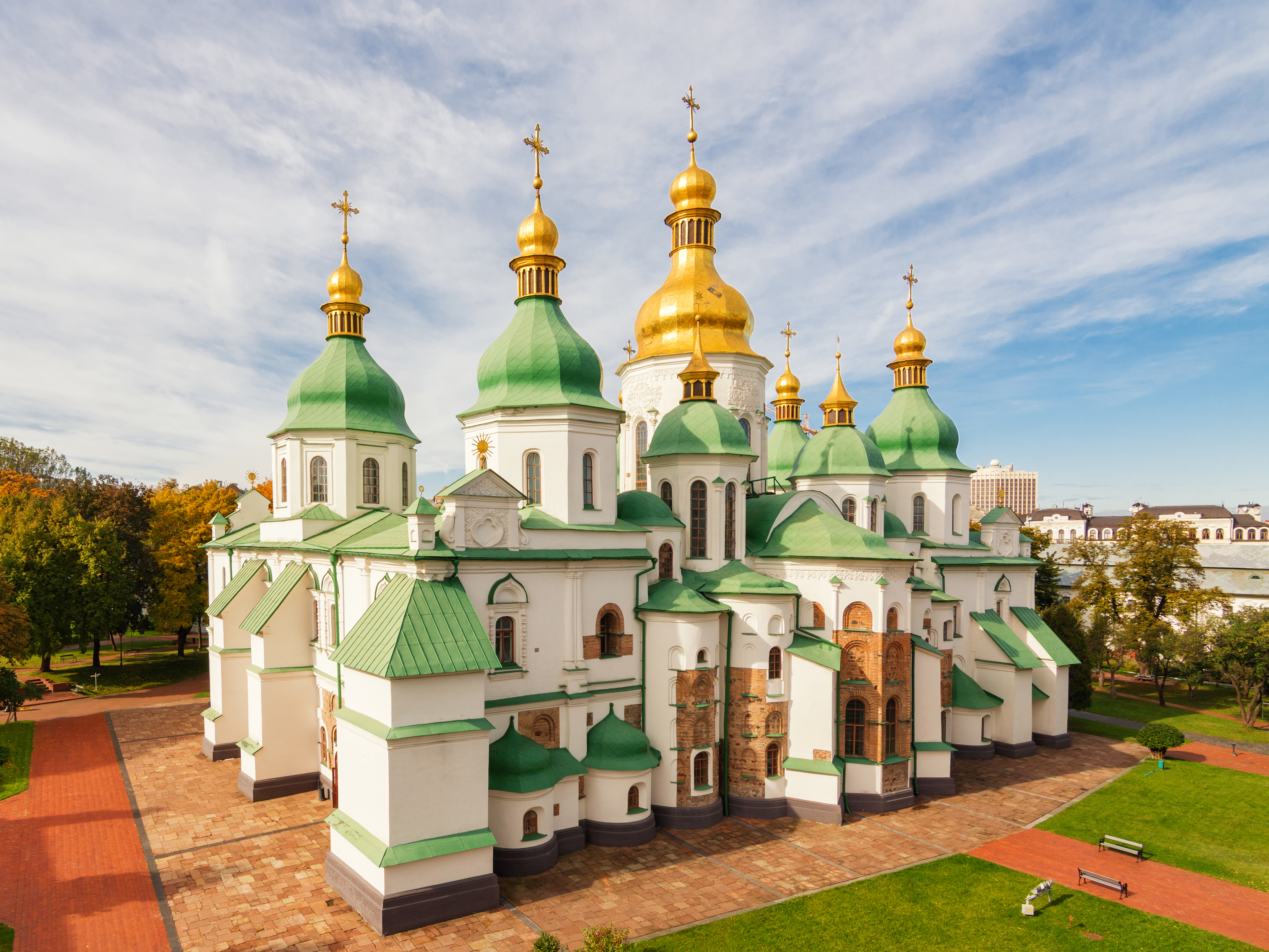 Софійський собор, Київ, вул. Володимирська, 24